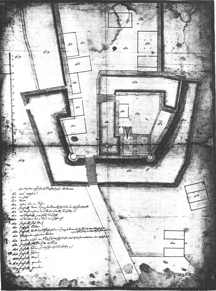 Schloss Jockgrim, Plan aus dem 18. Jh.